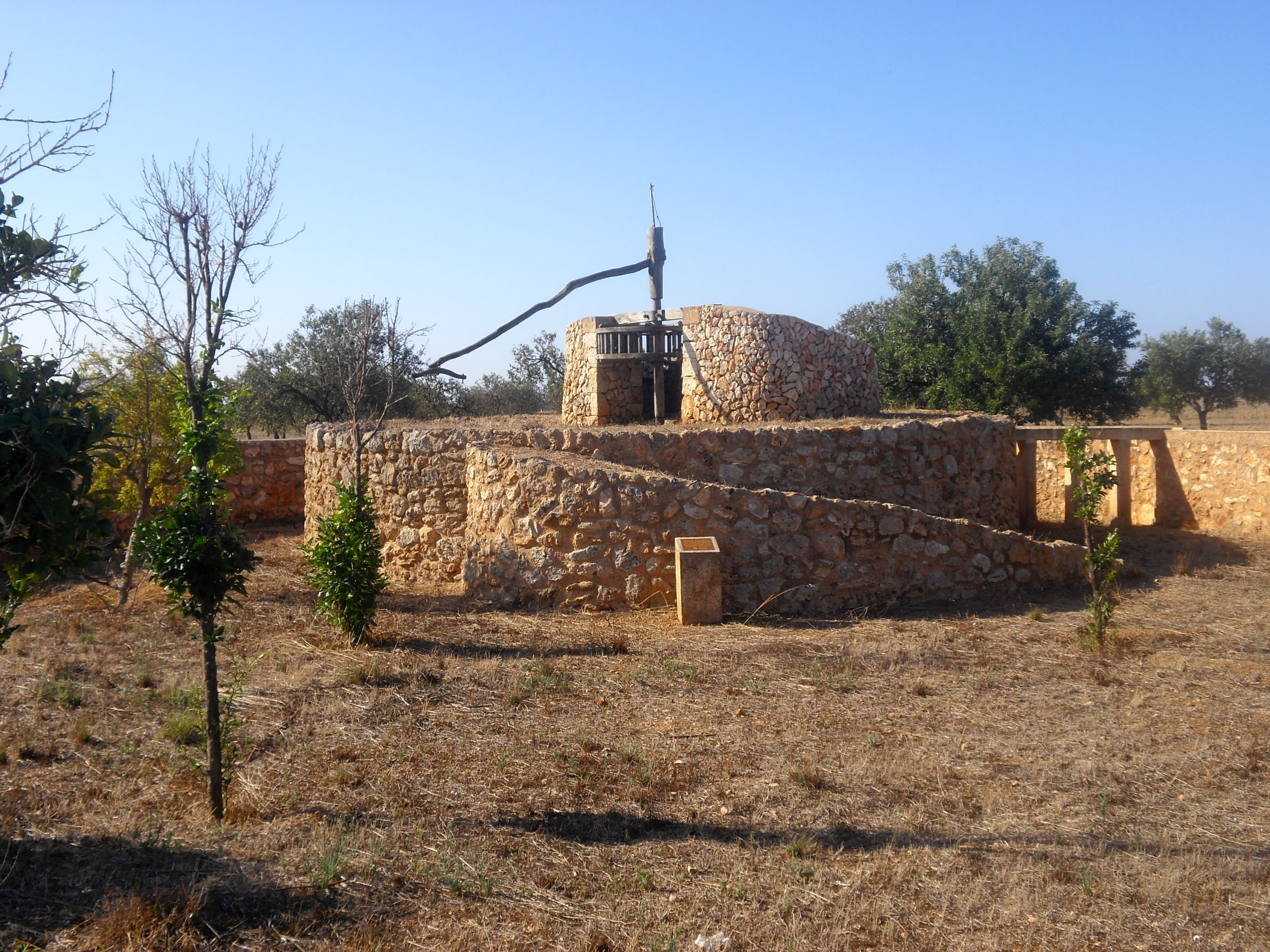 Sínia de la possessió de Son Catlar, a Campos, Mallorca.